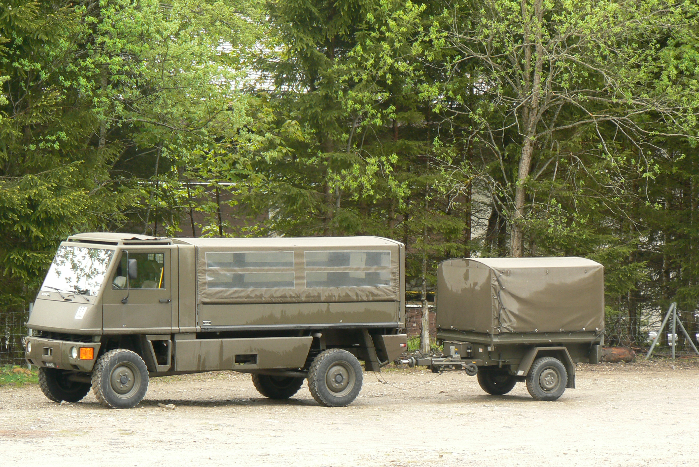 Duro der Schweizer Armee in Schwarzsee, Kanton FR